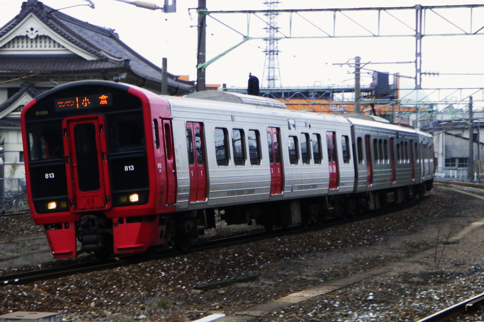 813系 Rm1104